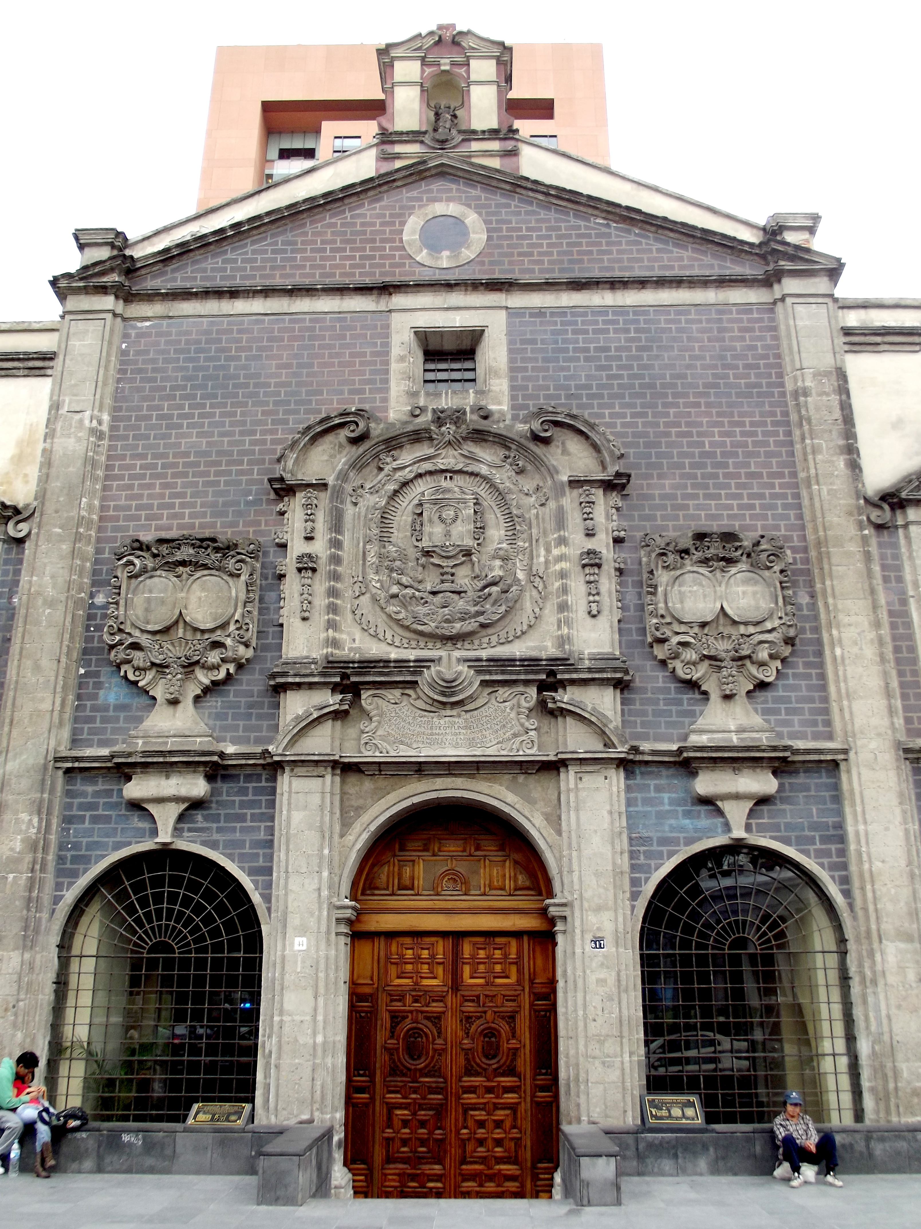 Antiguo Templo Corpus Christi, Archivo General de Notarías, Distrito Federal